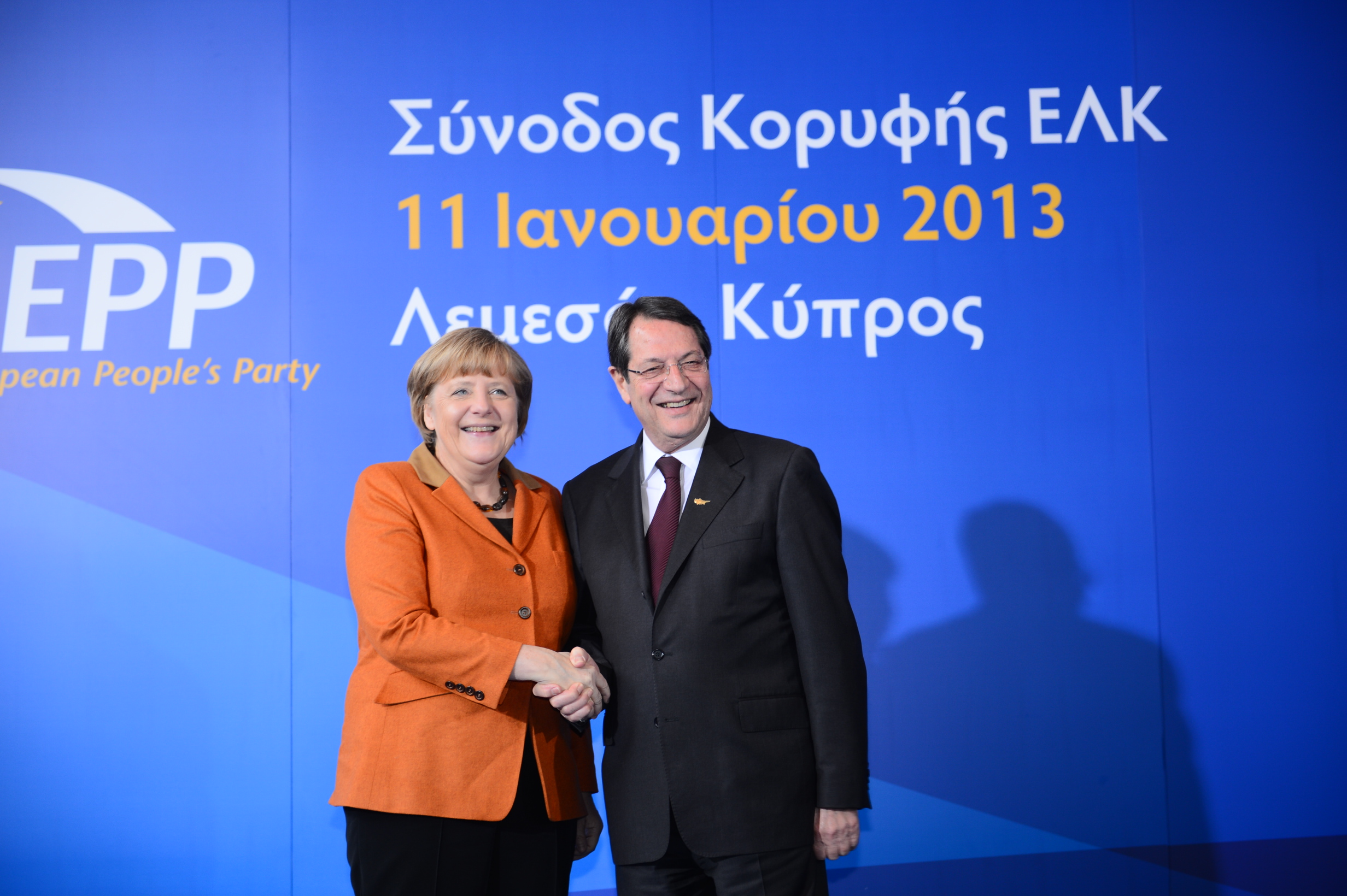 Nicos Anastasiades